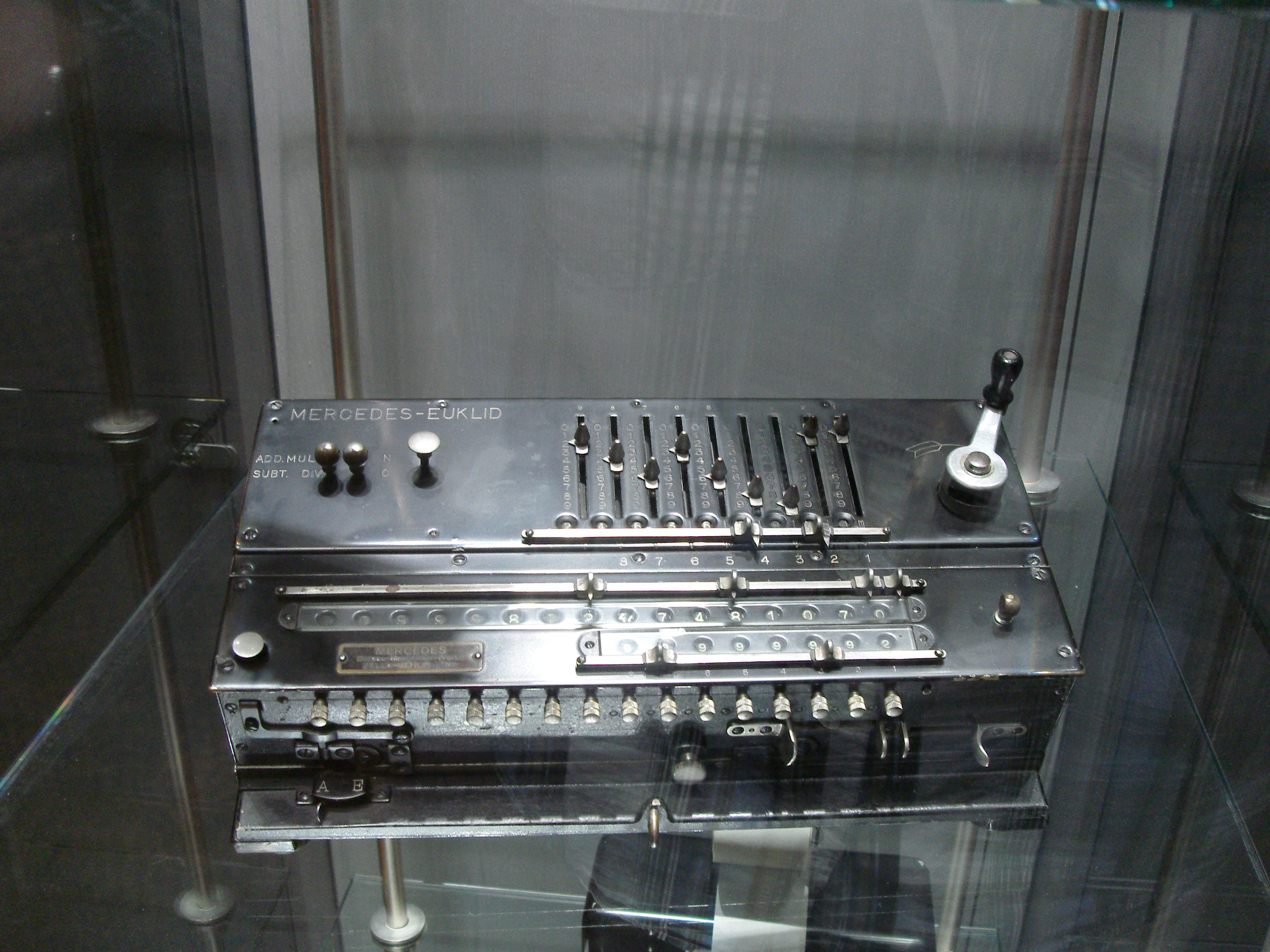 Mercedes Euklid Rechenmaschine - Ausstellungsstück der DASA in Dortmund